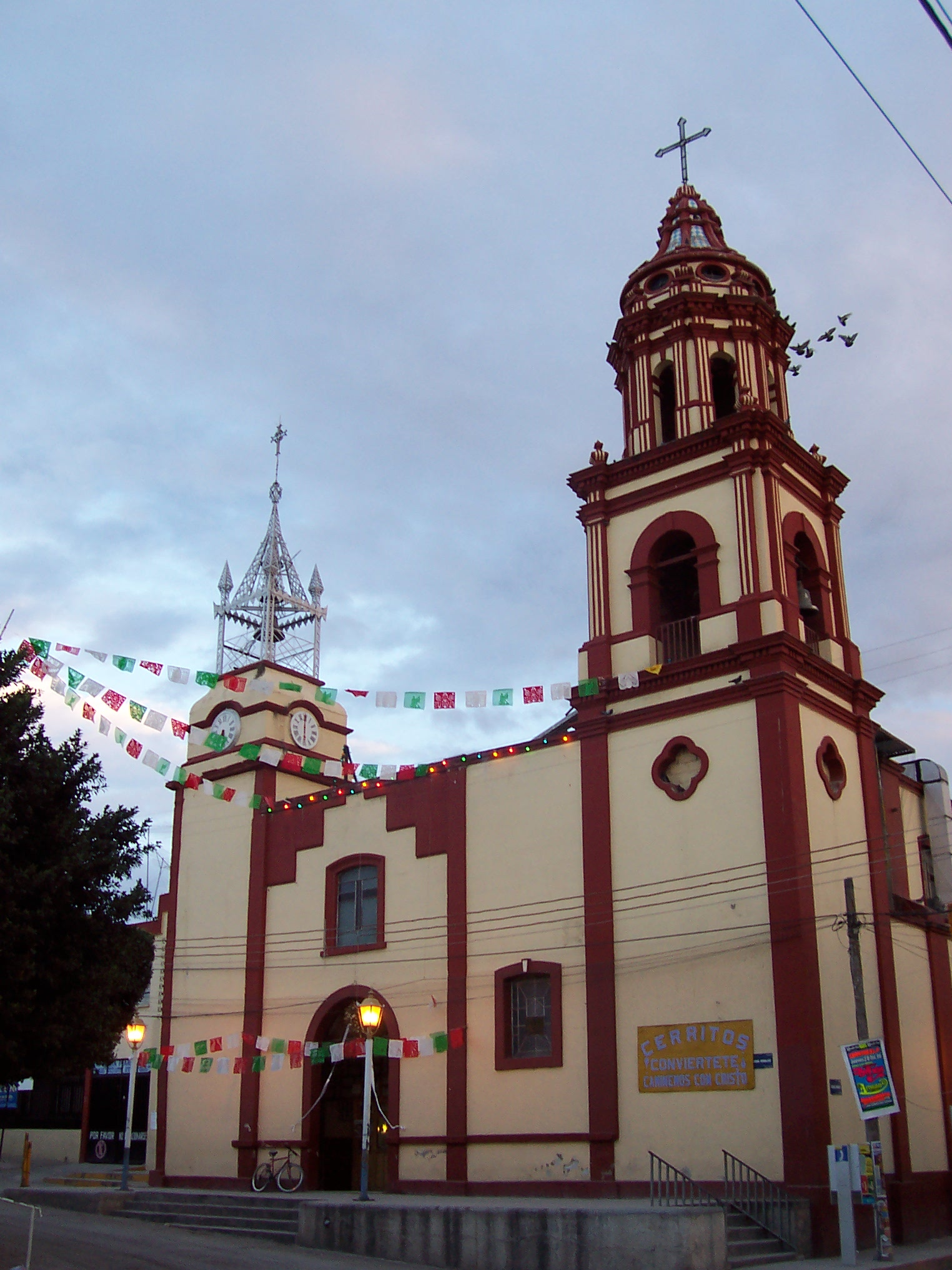 Iglesia de Cerritos, Babytexcoco tomó esta fotografía en diciembre 2006.